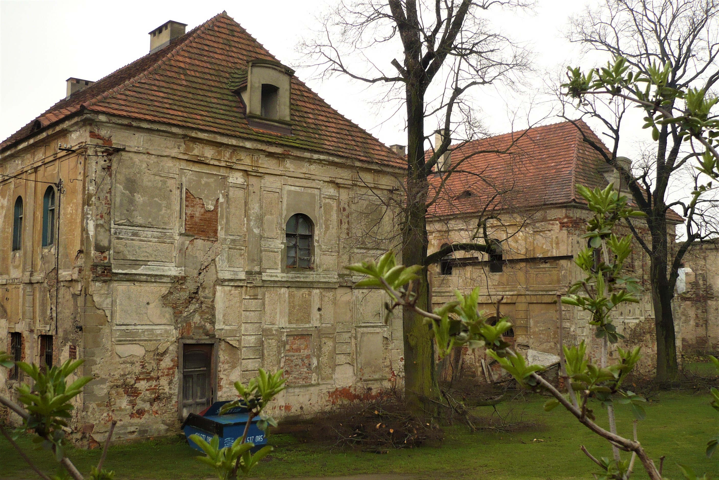 Budynek w Wierzbnej